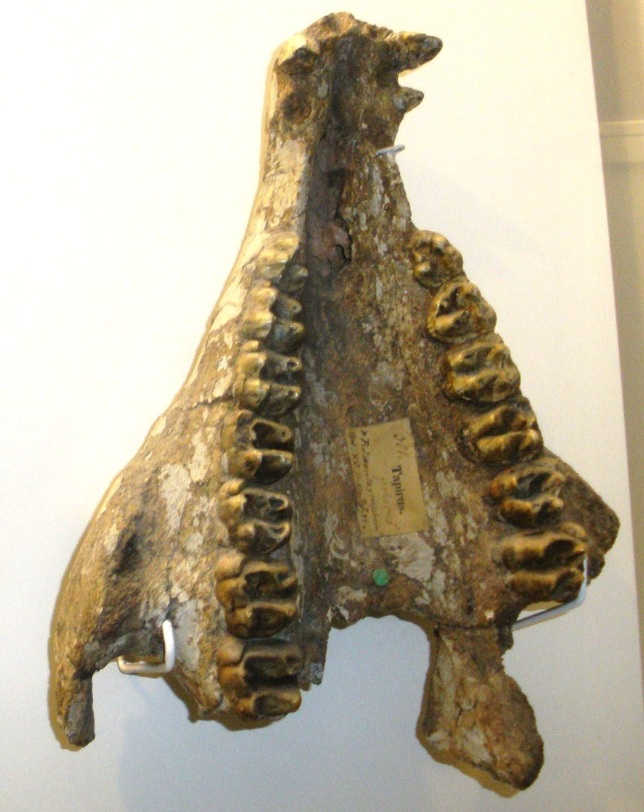 Fossil of Tapirus, an extinct mammal-- Took the photo at Natural History Museum, London